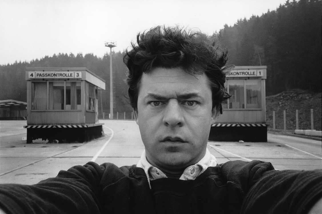 Selbstportrait von Hermann Stamm. Auszug aus der Serie: "Aus der Registratur des Nachdenkens".